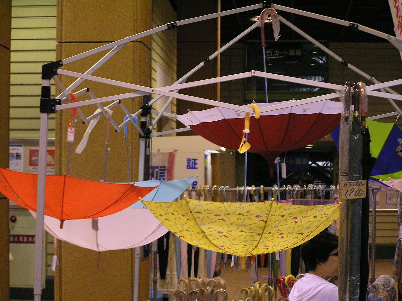 Umbrella 傘 サンシャインワーフ青木